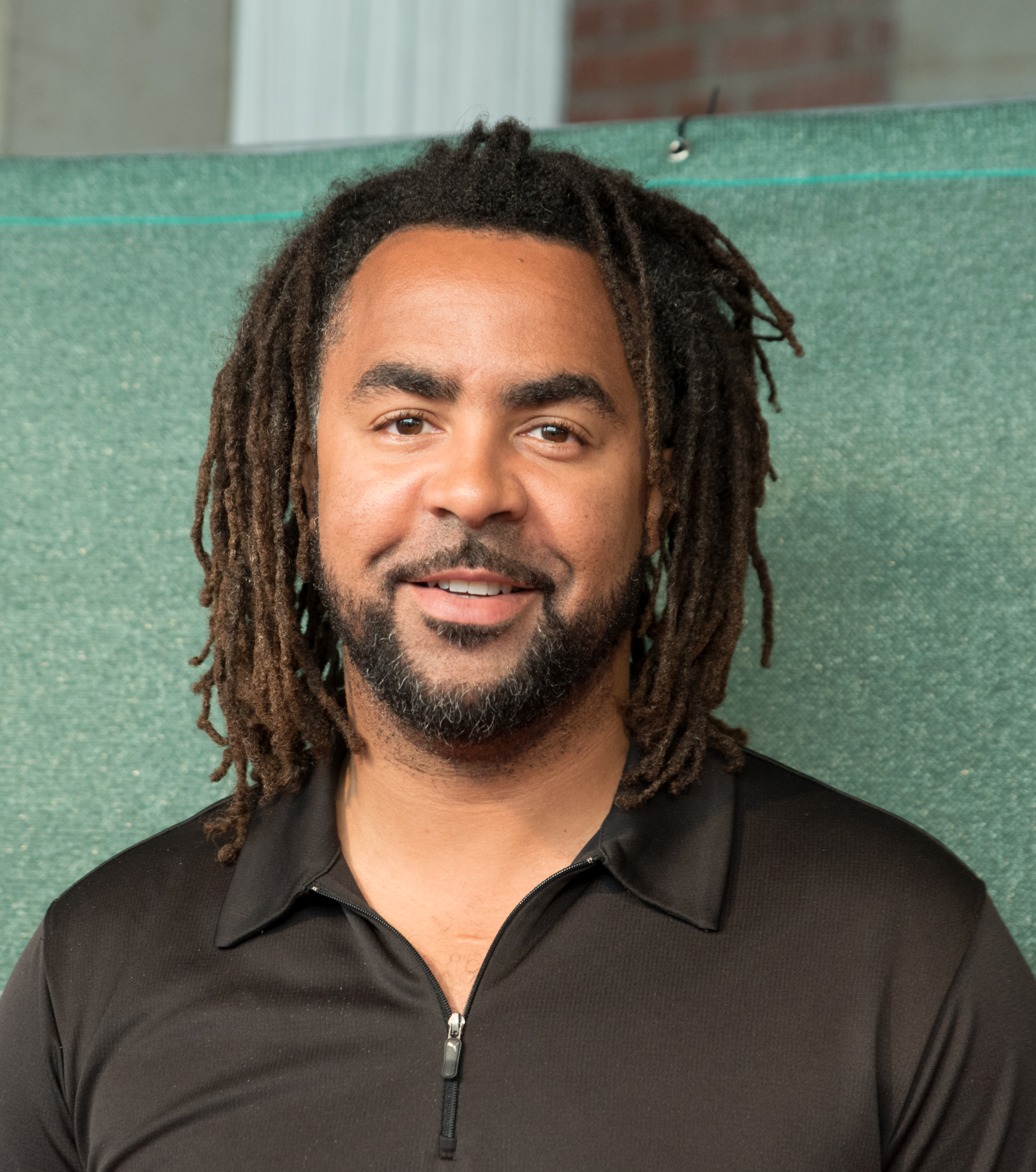 Patrick Owomoyela beim Tag der Legenden 2016 in Hamburg